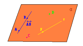 Plano, feito por Guilherme Augusto de Matheucci e Silva Teixeira.